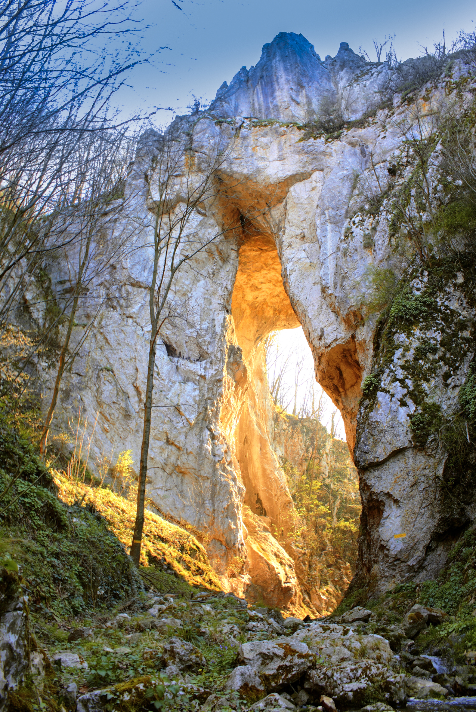 Ово је фотографија заштићеног природног добра у Србији под шифром: СП271 This is a a photo of a natural area in Serbia with ID: СП271 Прераст Ваља у заласку сунца